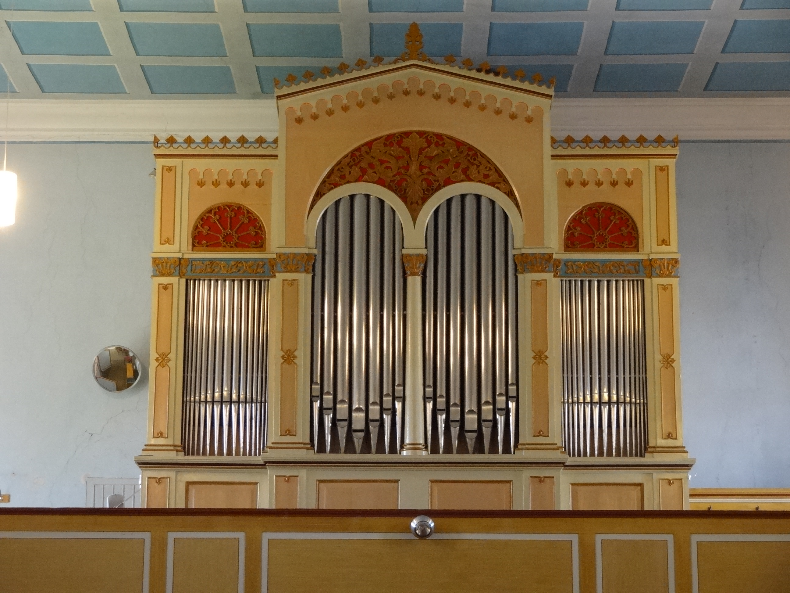 Evangelische Kirche Beuern